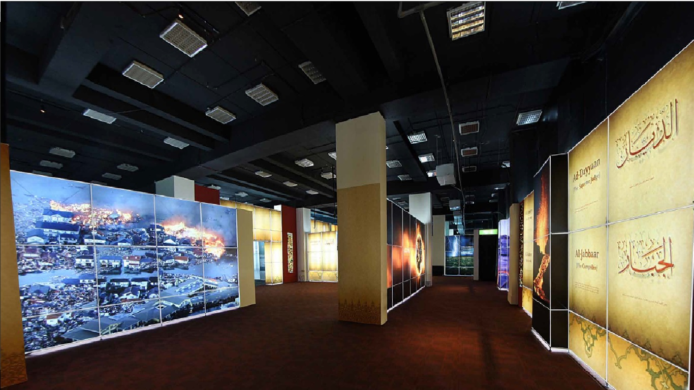 قاعة الخوف والخشية من الله في معرض أسماء الله الحسنى بالمدينة المنورة